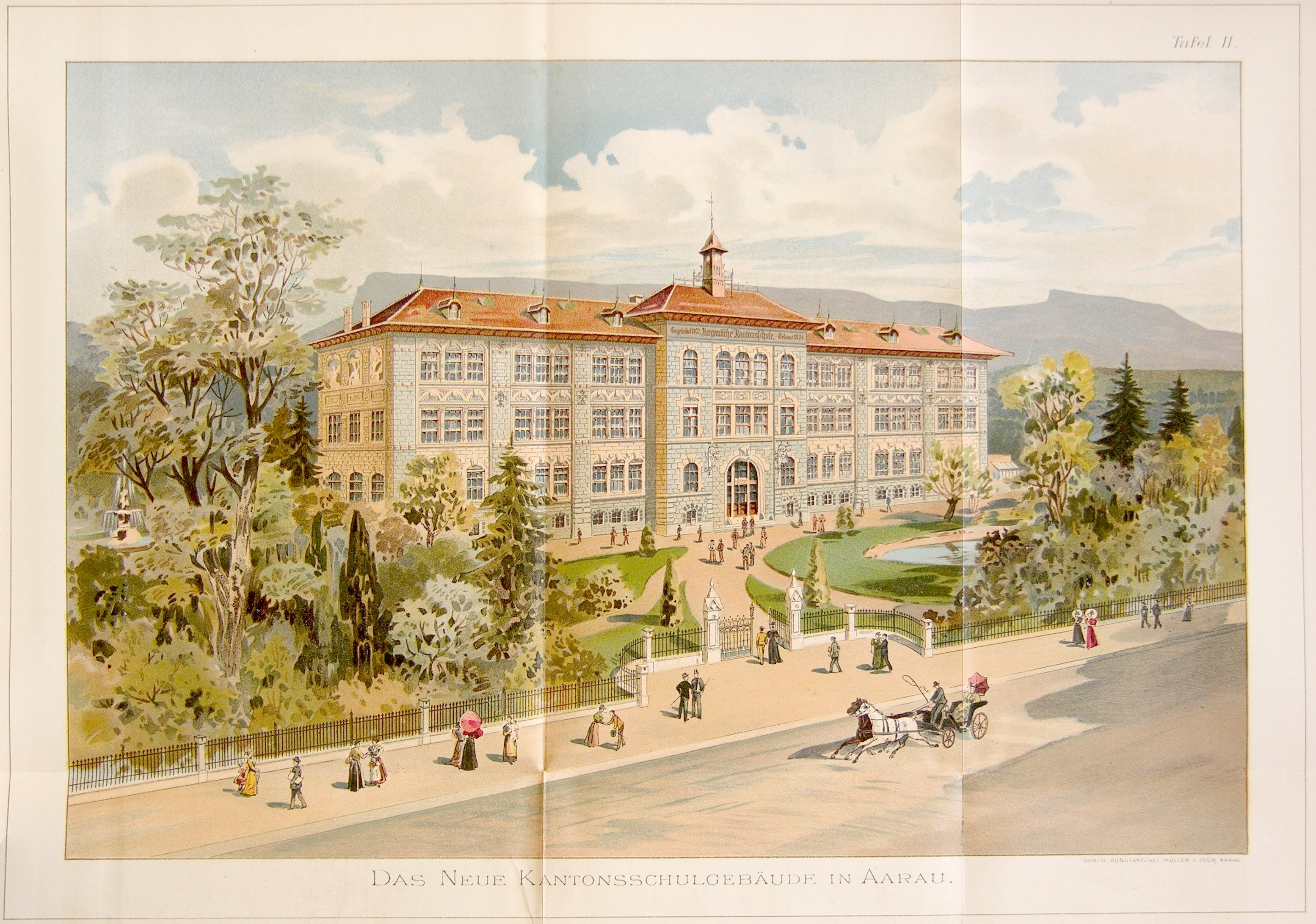 Boulevard vor dem Einstein-Haus der Alten Kantonsschule Aarau auf die Bahnhofsstrasse 1895